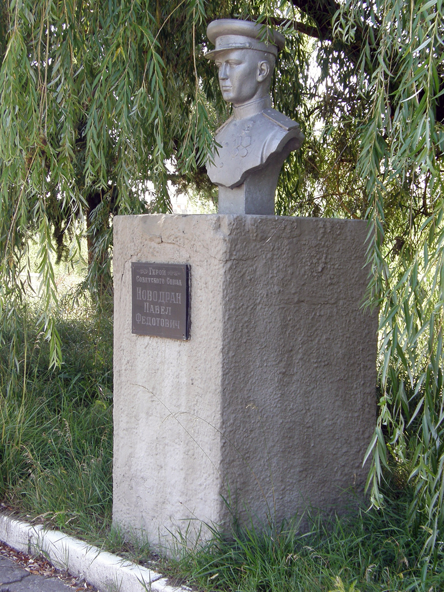 Меморіал: братська могила радянських воїнів Південного і Південно-Західного фронтів; пам'ятник Губарєву А. Г., Герою Радянського Союзу; пам'ятник Новодрану П. Ф., Герою Радянського Союзу; пам'ятник землякам, Бахмутський район, Бахмутський р-н, Сіверська м/р, м. Сіверськ, вул. Леніна, Парк Слави